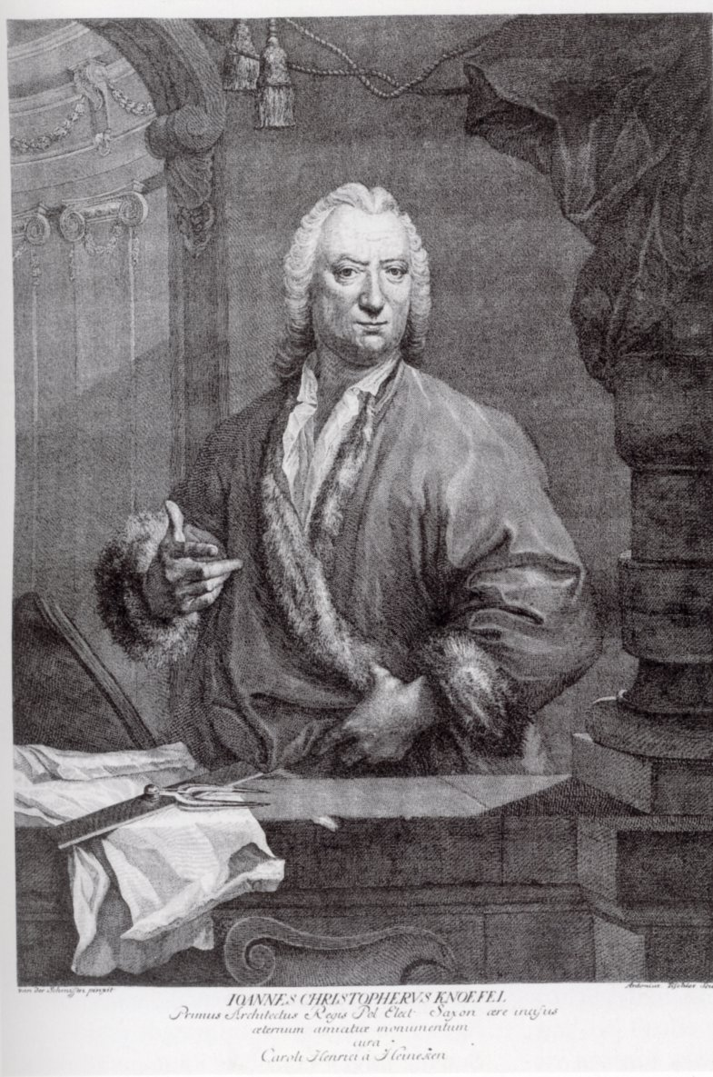 Antonius Tischler: Bildnis Johann Christoph Knöffel. Radierung (Dresden, Kupferstich-Kabinett Inv. Nr. A 138989)